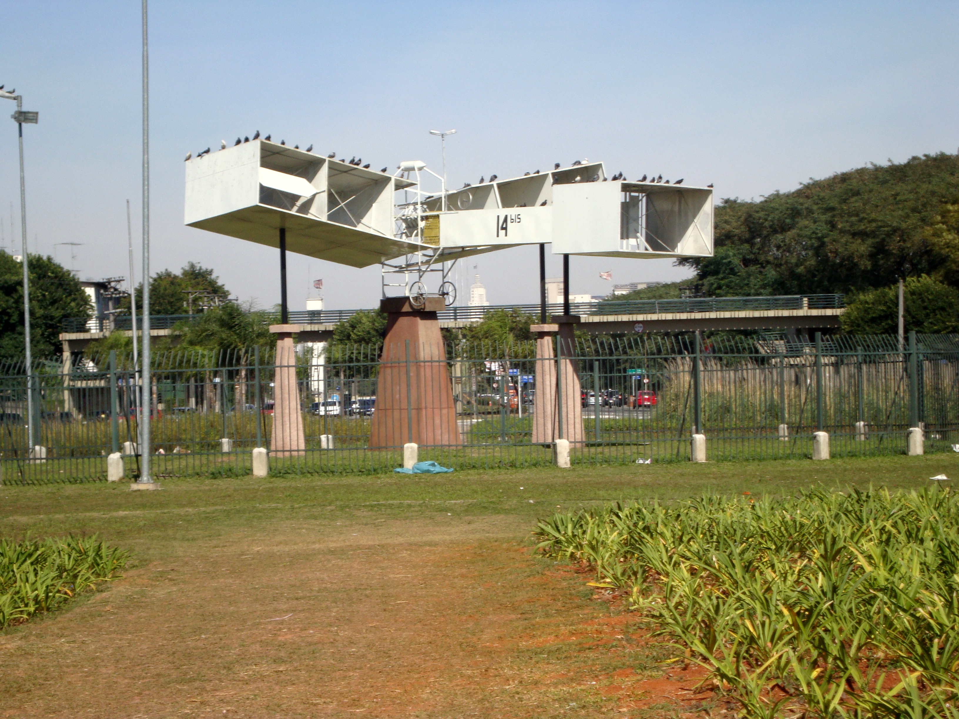 Foto da réplica do avião 14 Bis na Praça Campo de Bagatelle, distrito de Santana, Zona Norte paulistana.